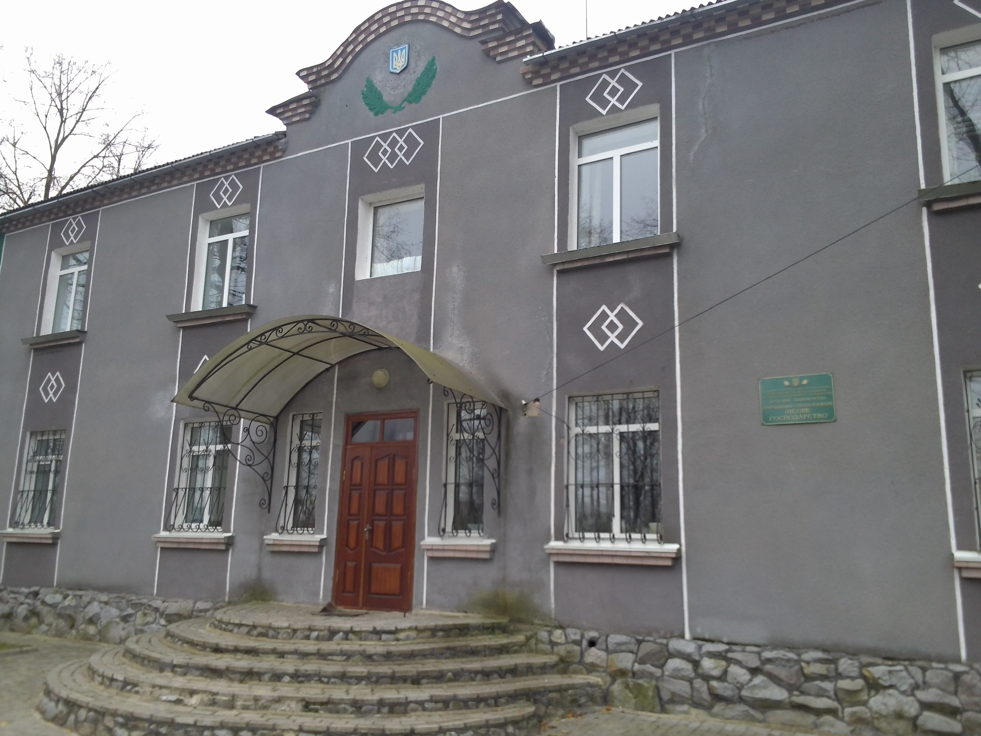 смт Народичі. Народицький спецлісгосп